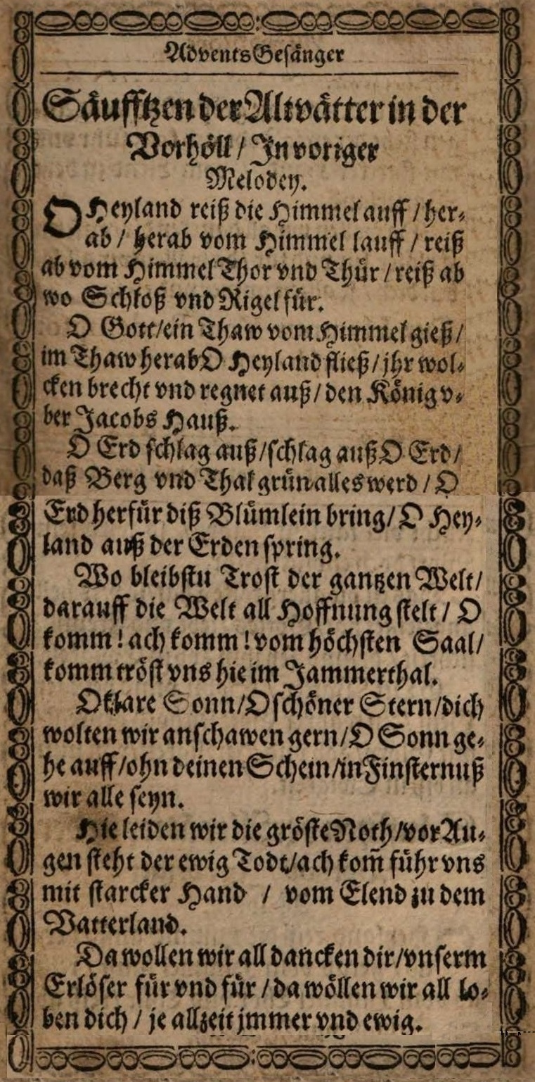 O Heiland, reiß die Himmel auf, Druckfassung 1630